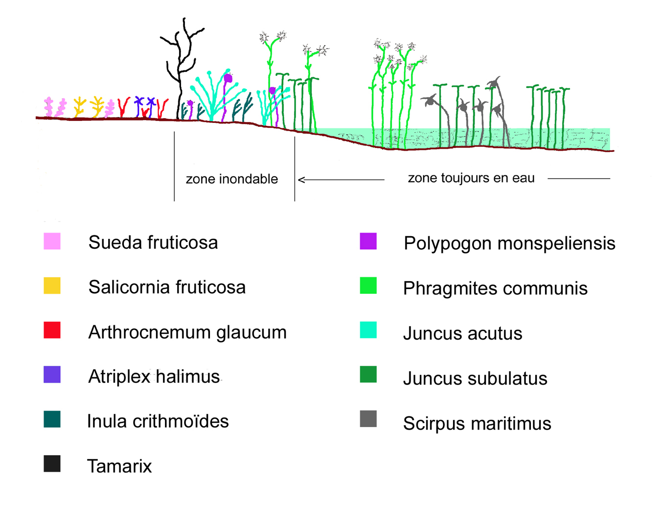 Représentation schématique de la végétation le long d'un transect (marais de la Macta, Algérie ; station 9 sur la carte de Krissat et Horr, 1976). De l'eau vers les rives, on observe : 1) sur le fond, un développement important d'algues filamenteuses ; une végétation aquatique composée de plantes enracinées dans les sédiments comme Zannichiella palustris, Scirpus maritimus et, plus fréquemment, Juncus lacustris ; 2a) sur les berges immergées, une roselière de Phragmites communis, des Tamarix, accompagnés de Juncus subulatus et de Juncus maritimus ; 2b) sur les berges parfois immergées, Juncus acutus en grosses touffes, Inula crithmoïdes ; 3) dans les zones non immergées, Salicornia fruticosa et diverses graminées.